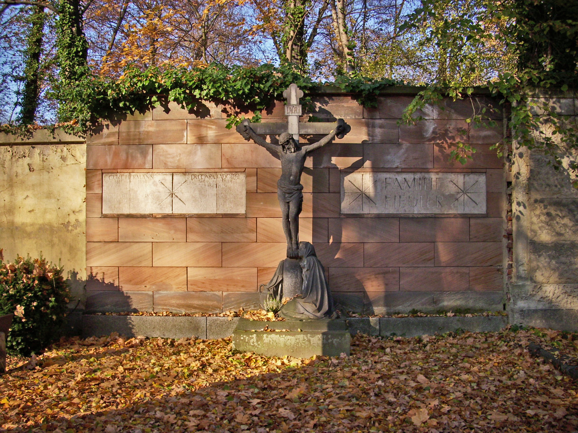 Grabstätte Conrad Fiedler und Angehörige, Südfriedhof Leipzig